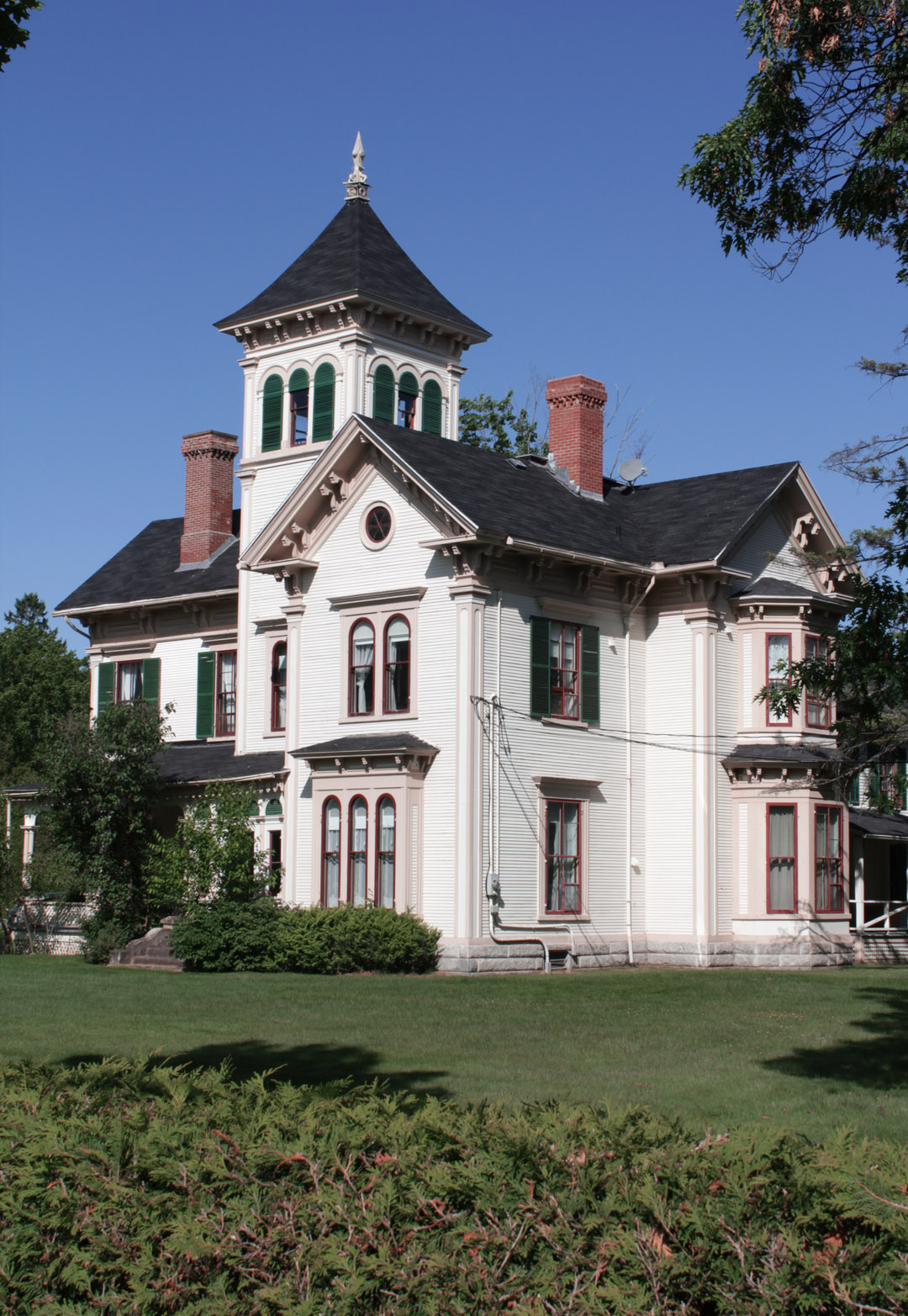 Butters House du Stanstead college à Stanstead, Québec